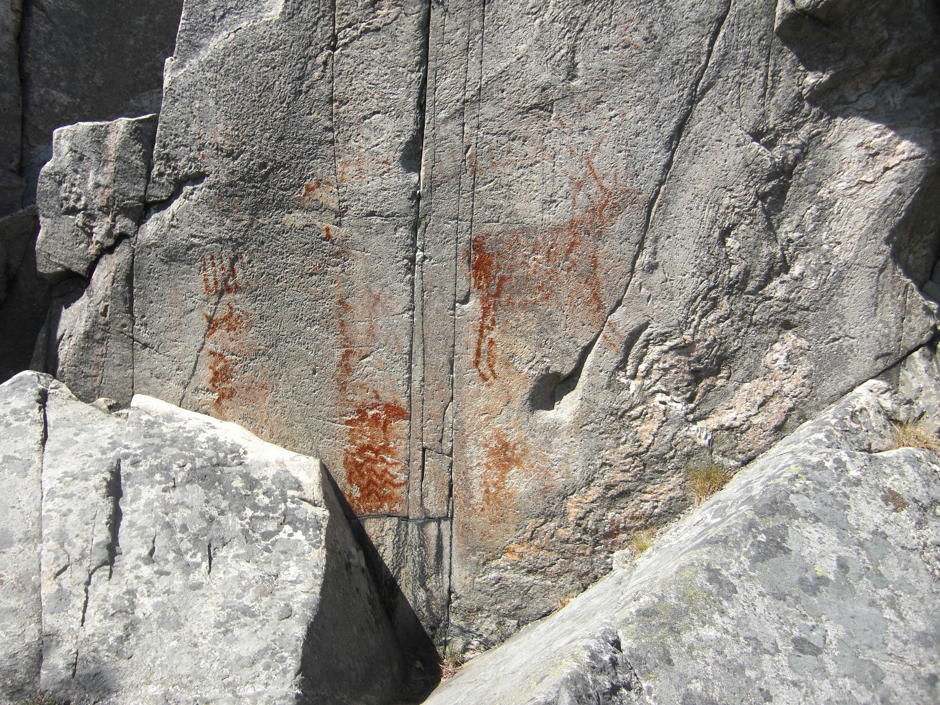 Hällmålningen i Tumlehed (RAÄ-nr Torslanda 216:1) i Torslanda socken, Västra Hisings härad, Göteborgs kommun, Bohuslän, Västra Götalands län, Sverige. Hällmålningen verkar föreställa en hjort, delfiner och fiskenät. Rödockran är digitalt förstärkt i Photoshop.